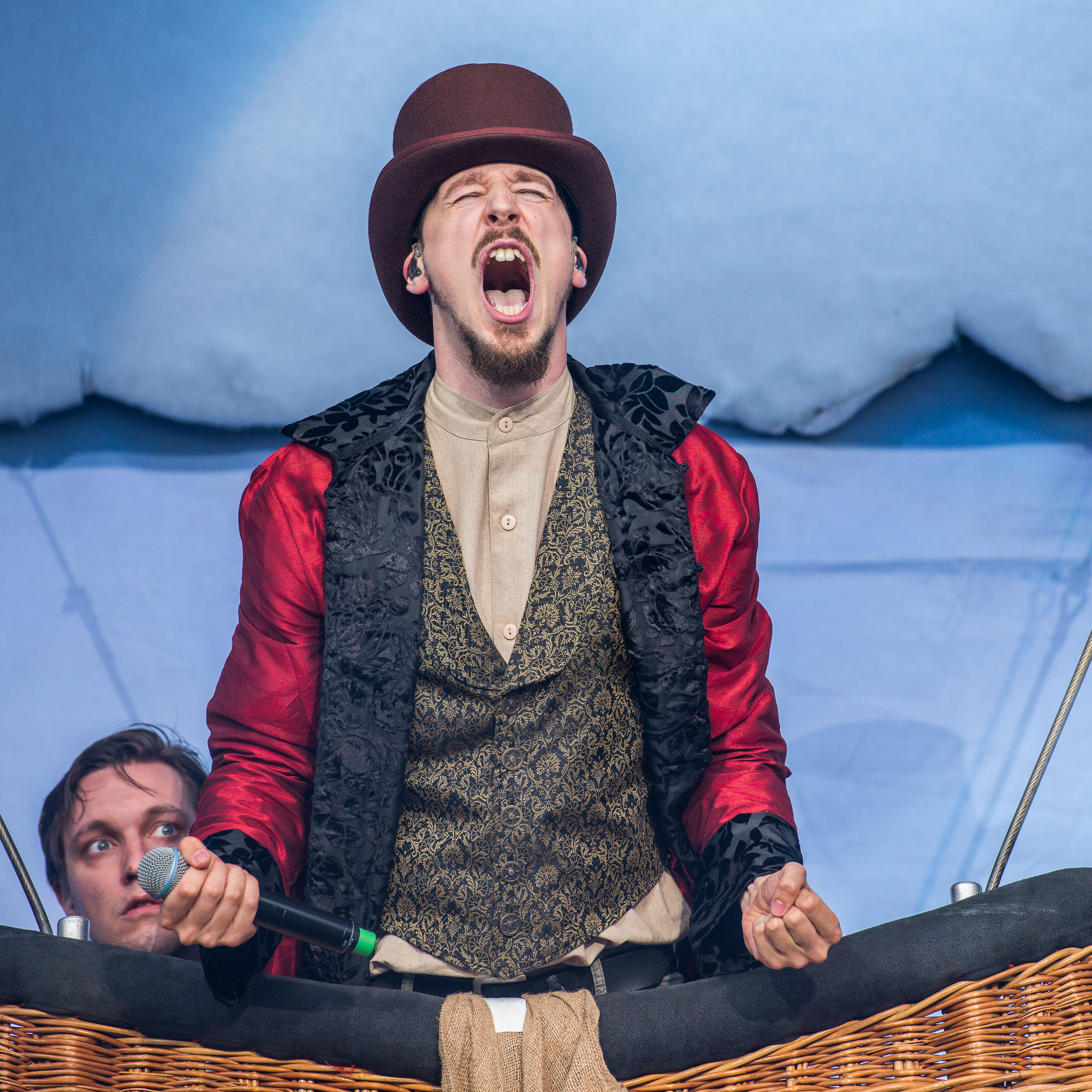 ARGO-Konzerte,Alligatoah,Beck's Park Stage,Festival,Konzert,Livekonzert,Livemusik,Musik,RiP,Rock im Park 2016